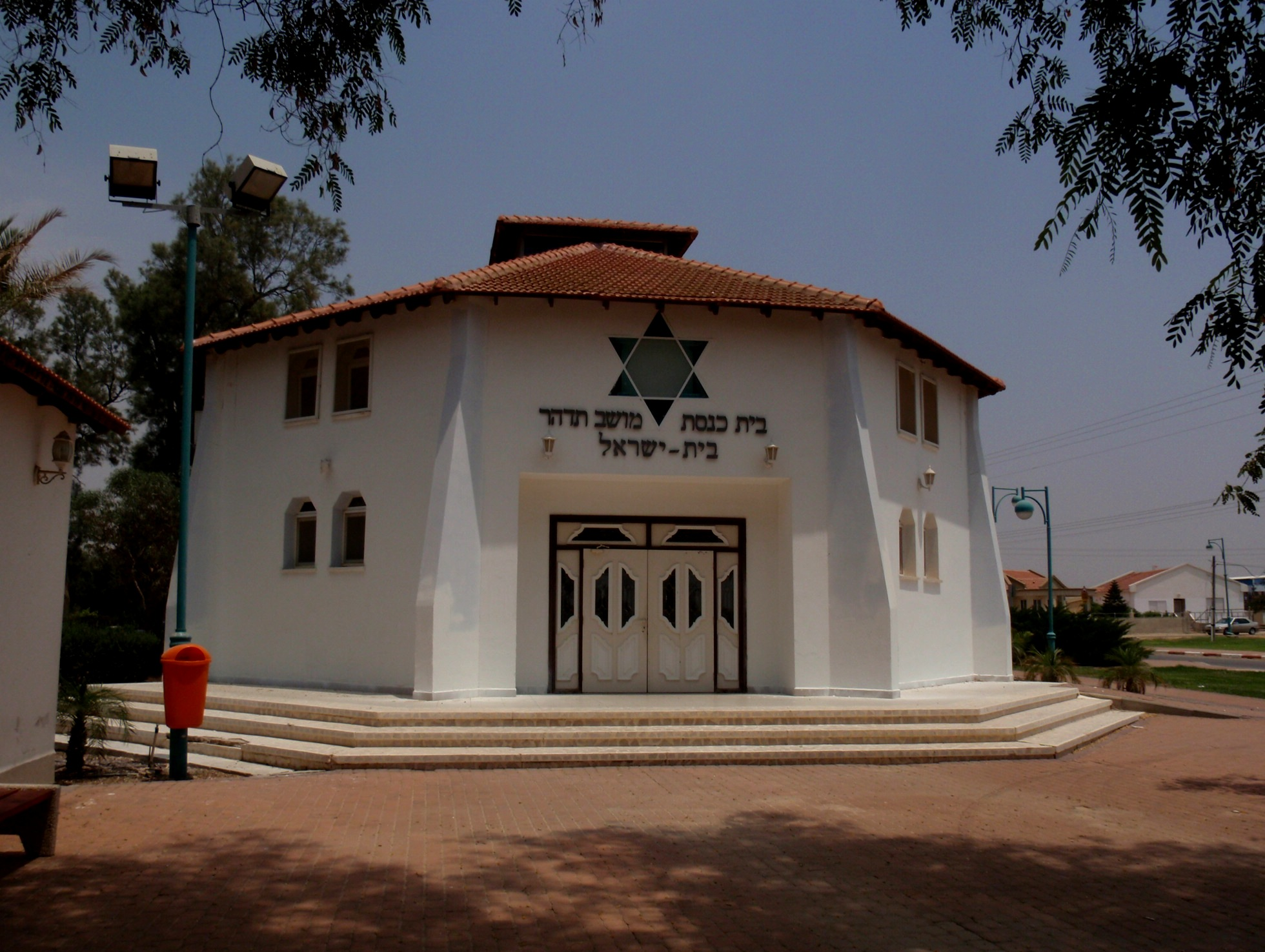 תדהר בית הכנסת